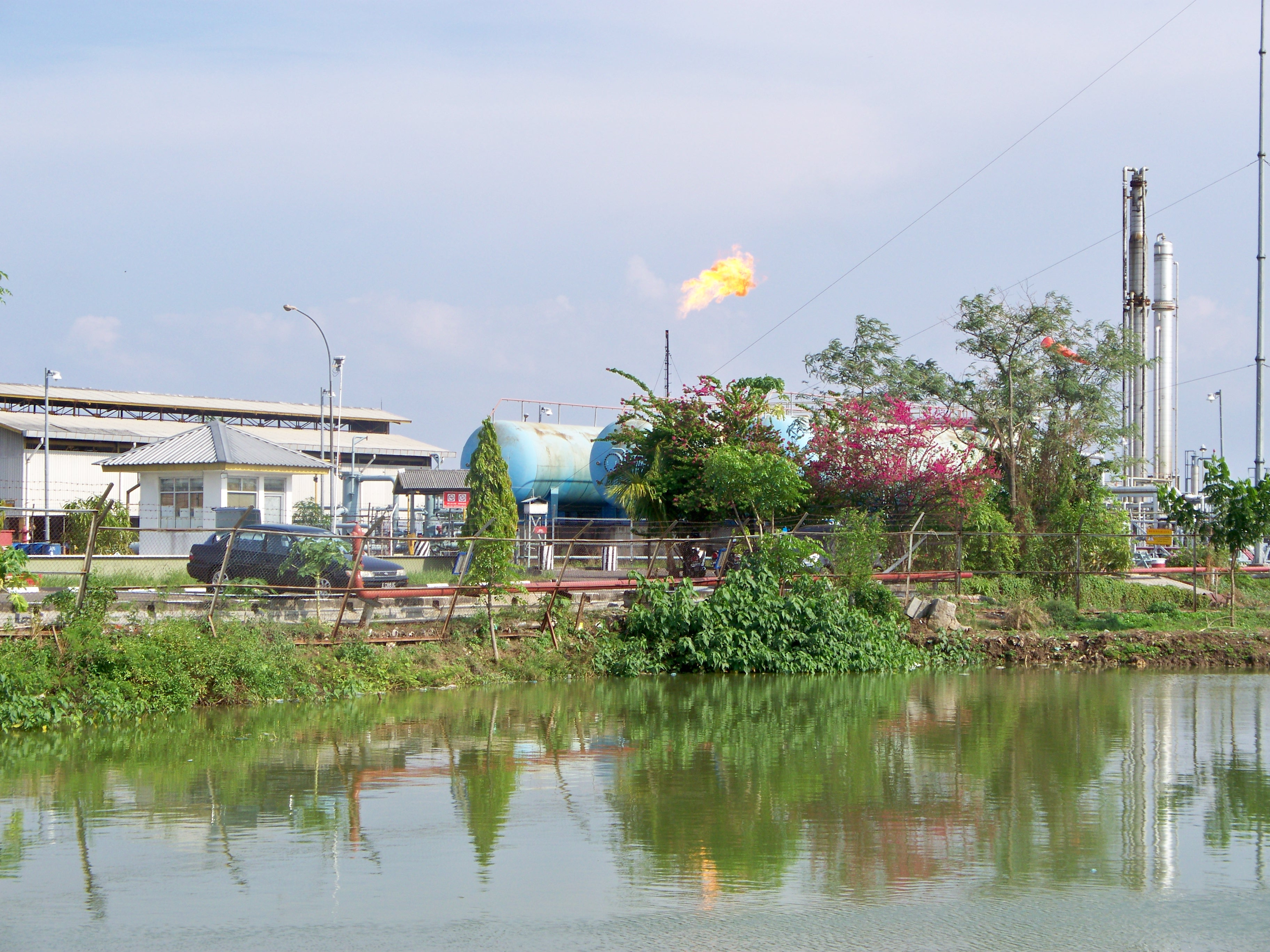 Pertamina Wirakanan